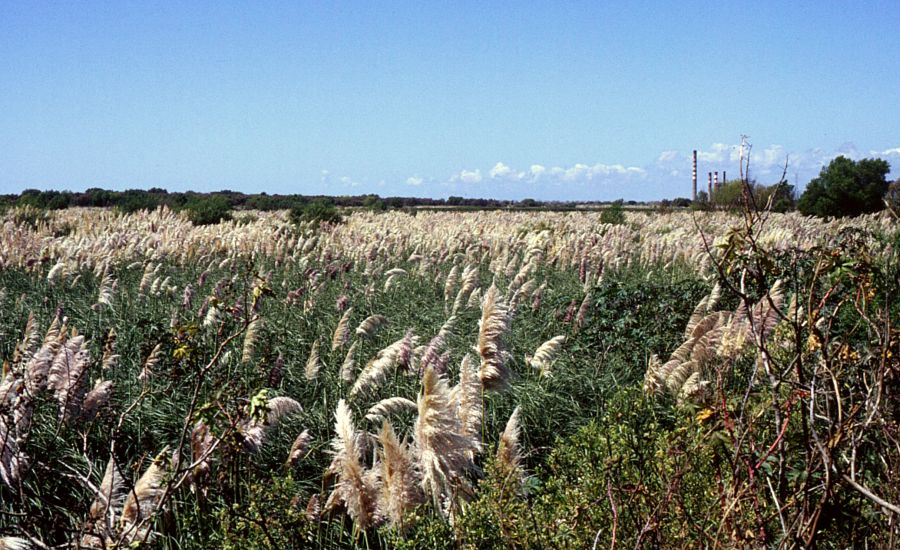 Cortaderia selloana, Süßgräser (Poaceae) - Argentinien/Argentina, Buenos Aires, Reserva Ecológica Costanera Sur